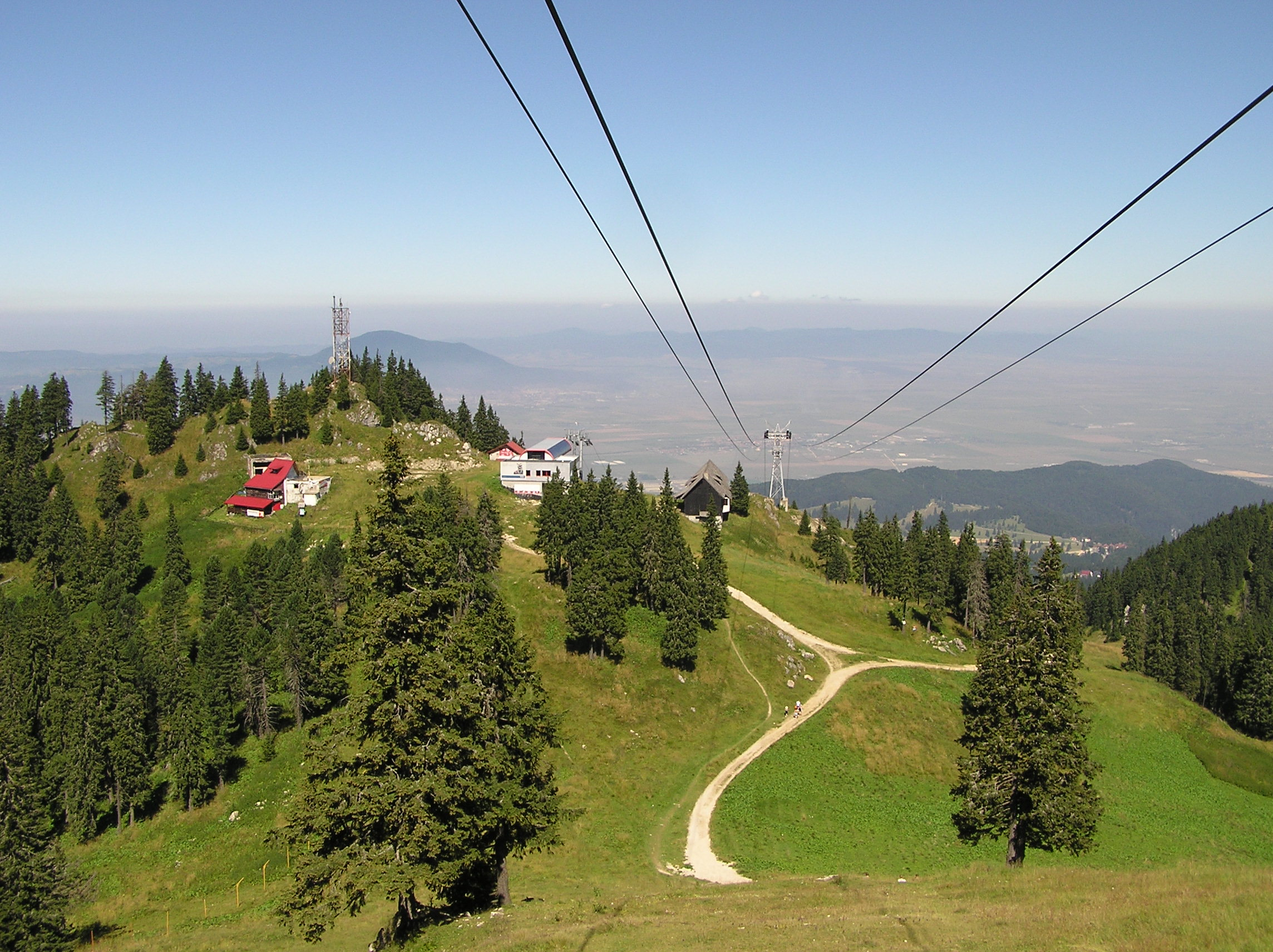 Ansicht in nördliche Richtung vom Postăvarul-Gebirge / Schuler in Siebenbürgen, Rumänien.